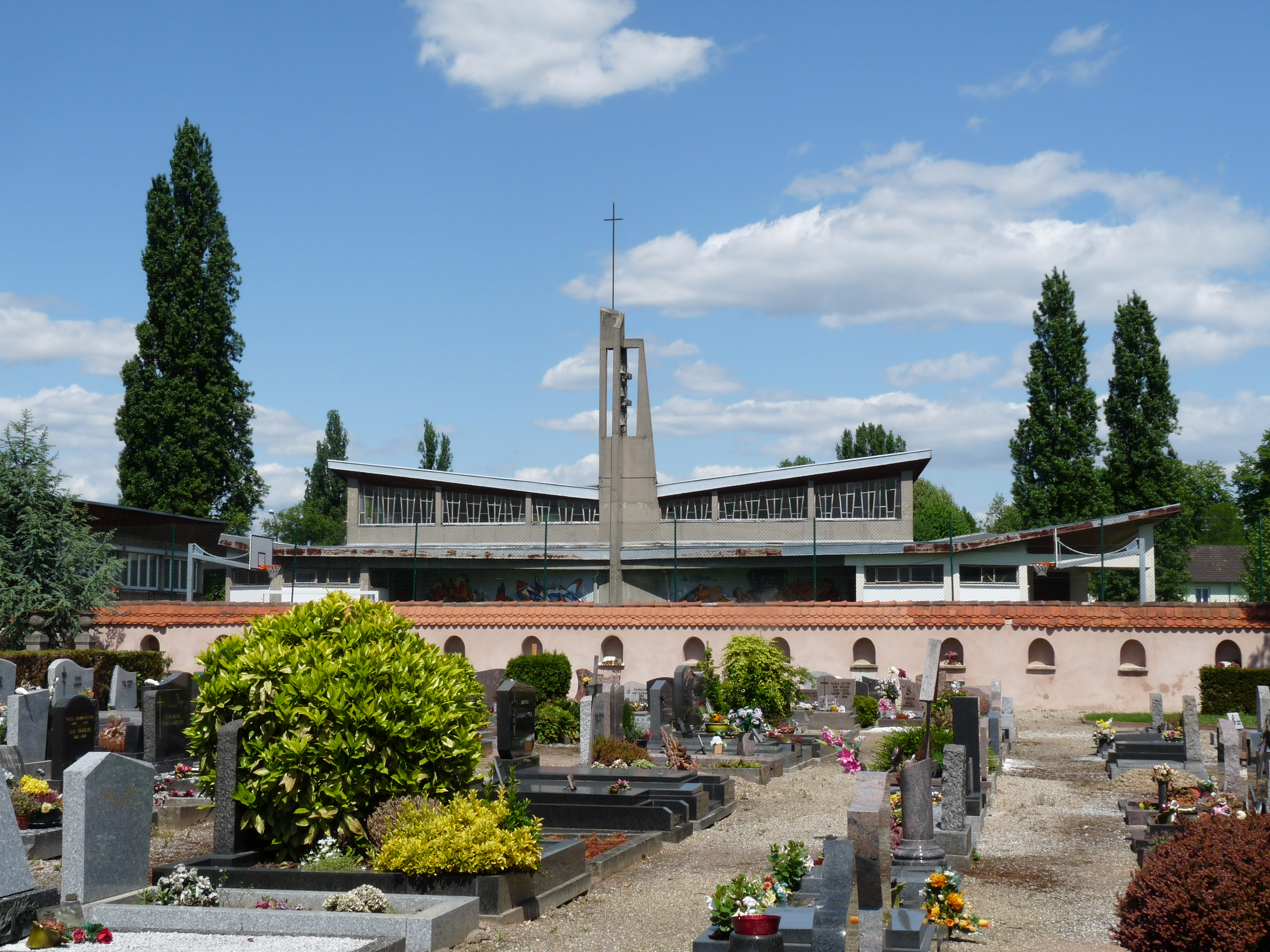 Eglise protestante de la Cité de l'Ill (Strasbourg), vue depuis le Cimetière Nord